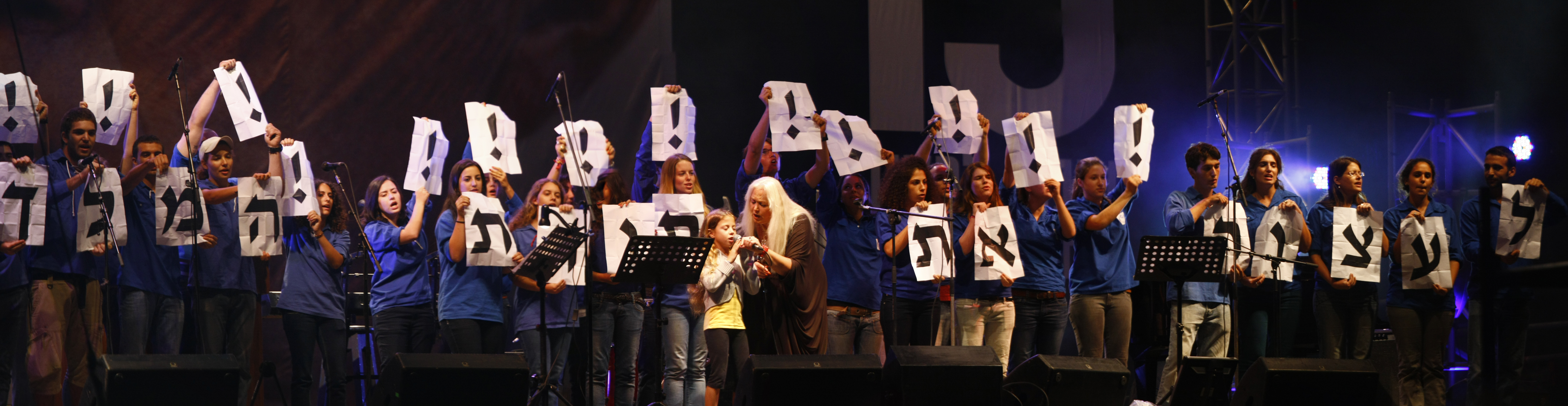 חניכי תנועות הנוער (השומר הצעיר, המחנות העולים והנוער העובד והלומד) מניפים במהלך שירת "שיר לשלום" בעצרת הזיכרון הממלכתית לרצח ראש הממשלה יצחק רבין (2010) שלט הקורא לעצור את ספר ההלכה הגזעני "תורת המלך".